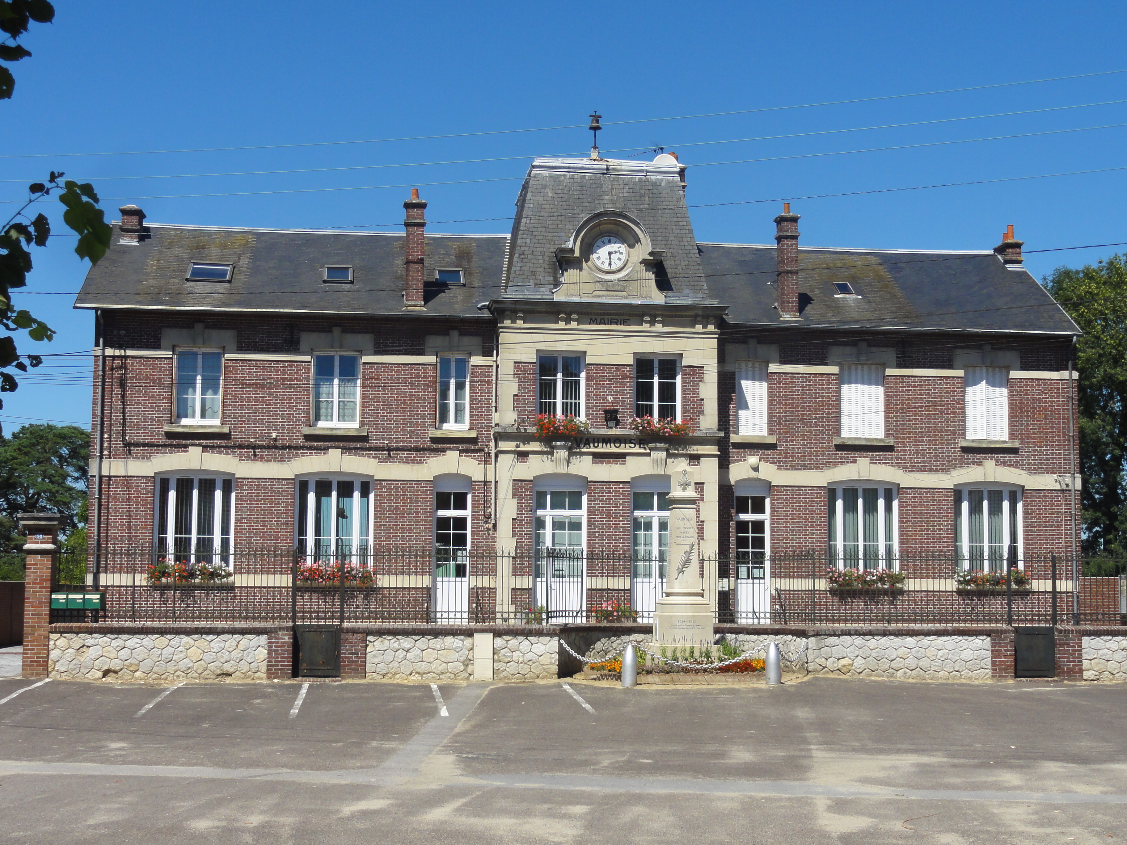 Mairie, RD 1324.